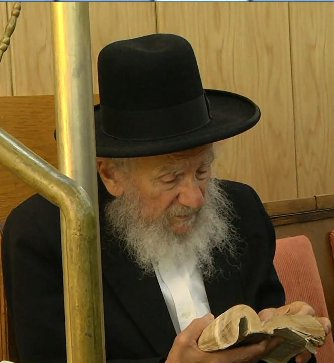 הרב יעקב אדלשטיין